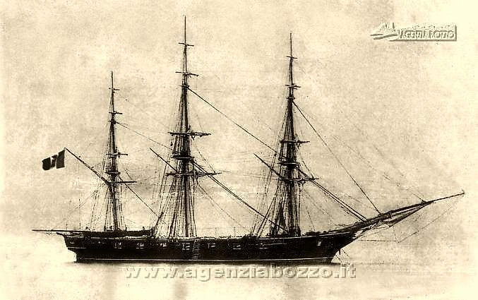 La corvetta a vela Iride alla fonda a Napoli